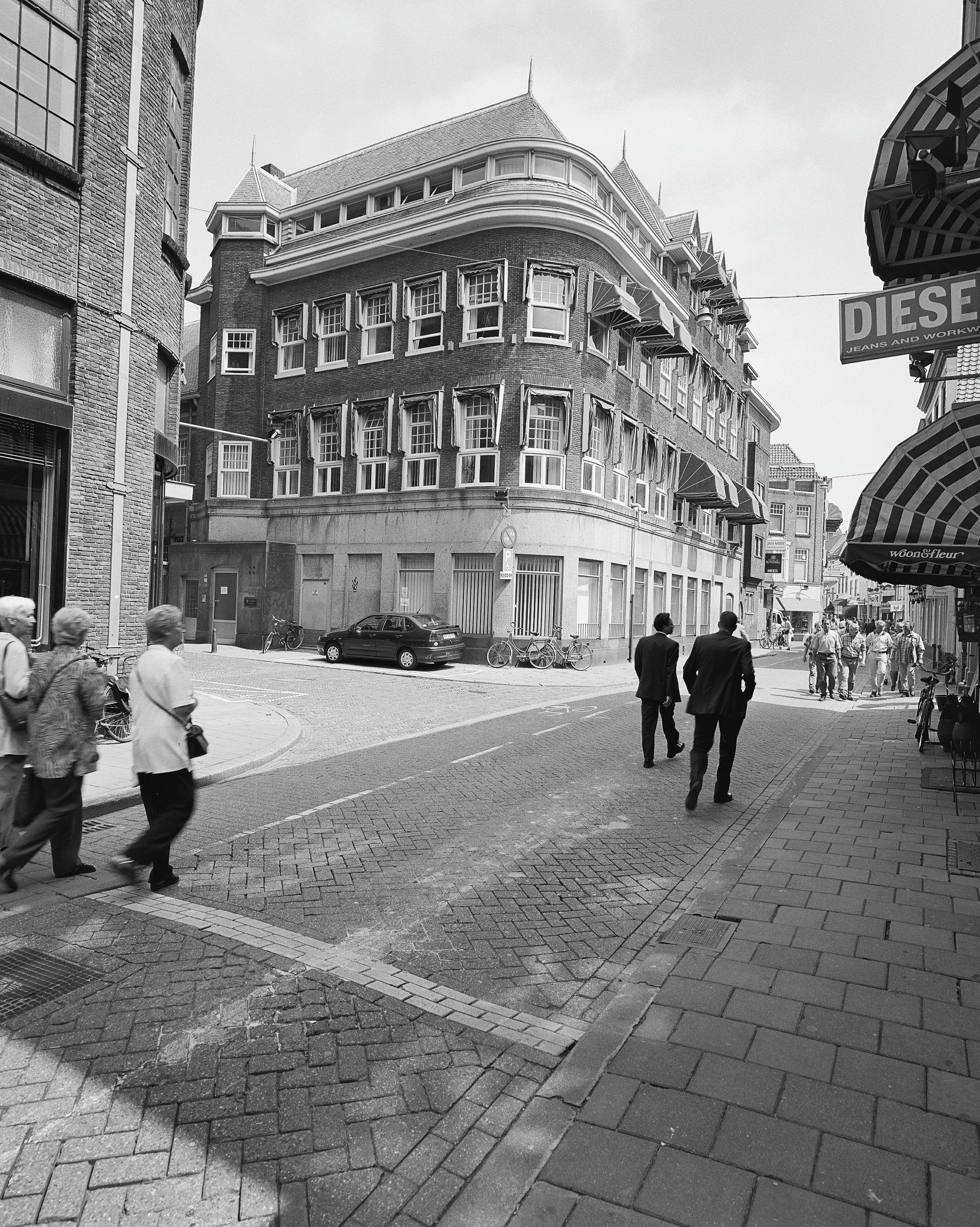 Stadhuis: Exterieur overzicht linkerzijgevel